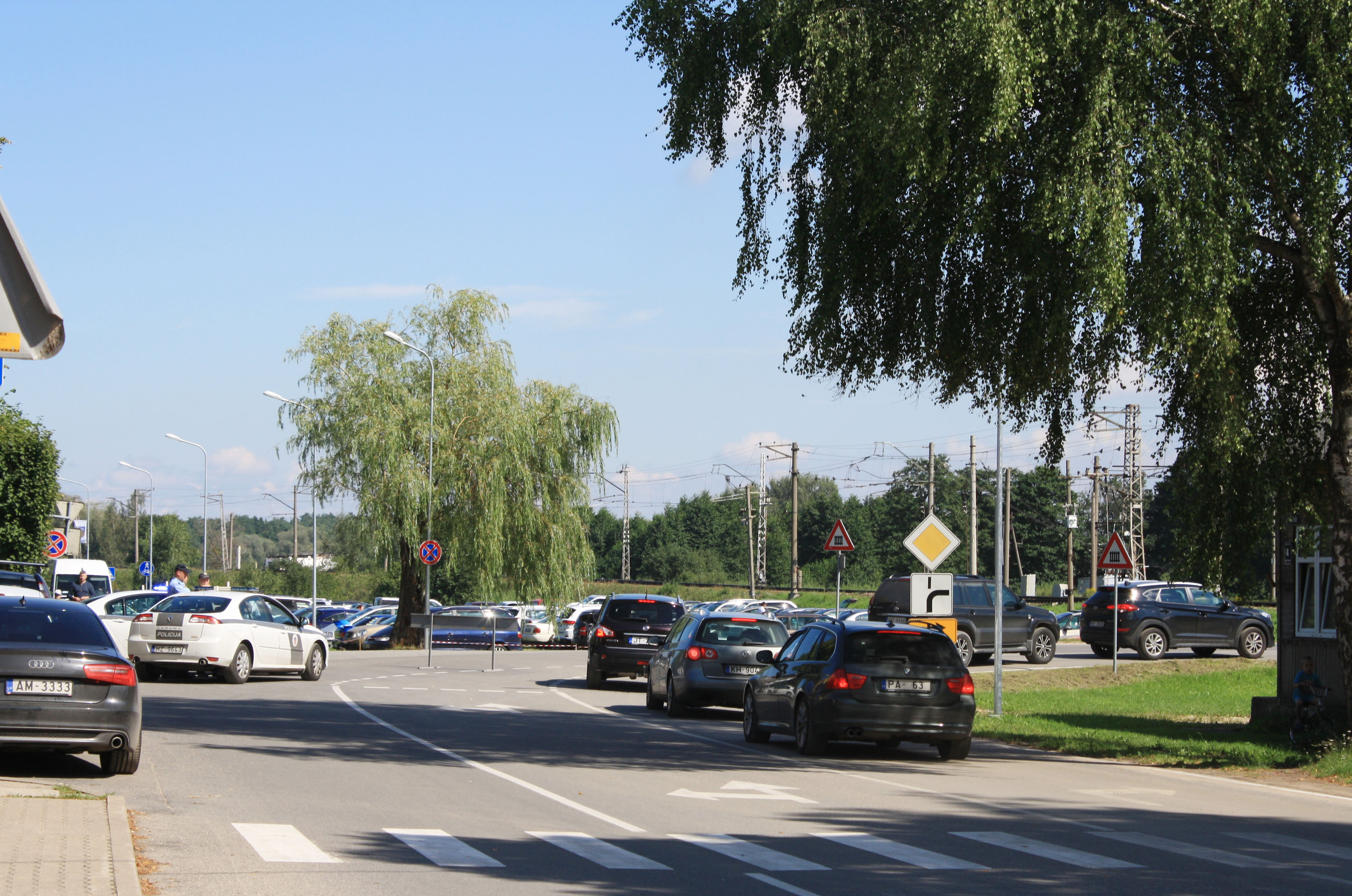 Царникава (Латвия). Праздник миноги - государственная полиция контролирует движение. Please help me to release my project - create a beautiful photograph album «The 100 Views of Latvia» for the anniversary of the state in 2018 Lūdzu atbalstu, lai projekts - fotoalbums «Latvijas 100 skati» uz valsts jubilejai 2018. gadā Прошу поддержки для реализации проекта - фотоальбом «100 видов прекрасной Латвии» к юбилею Латвийской Республики в 2018 году